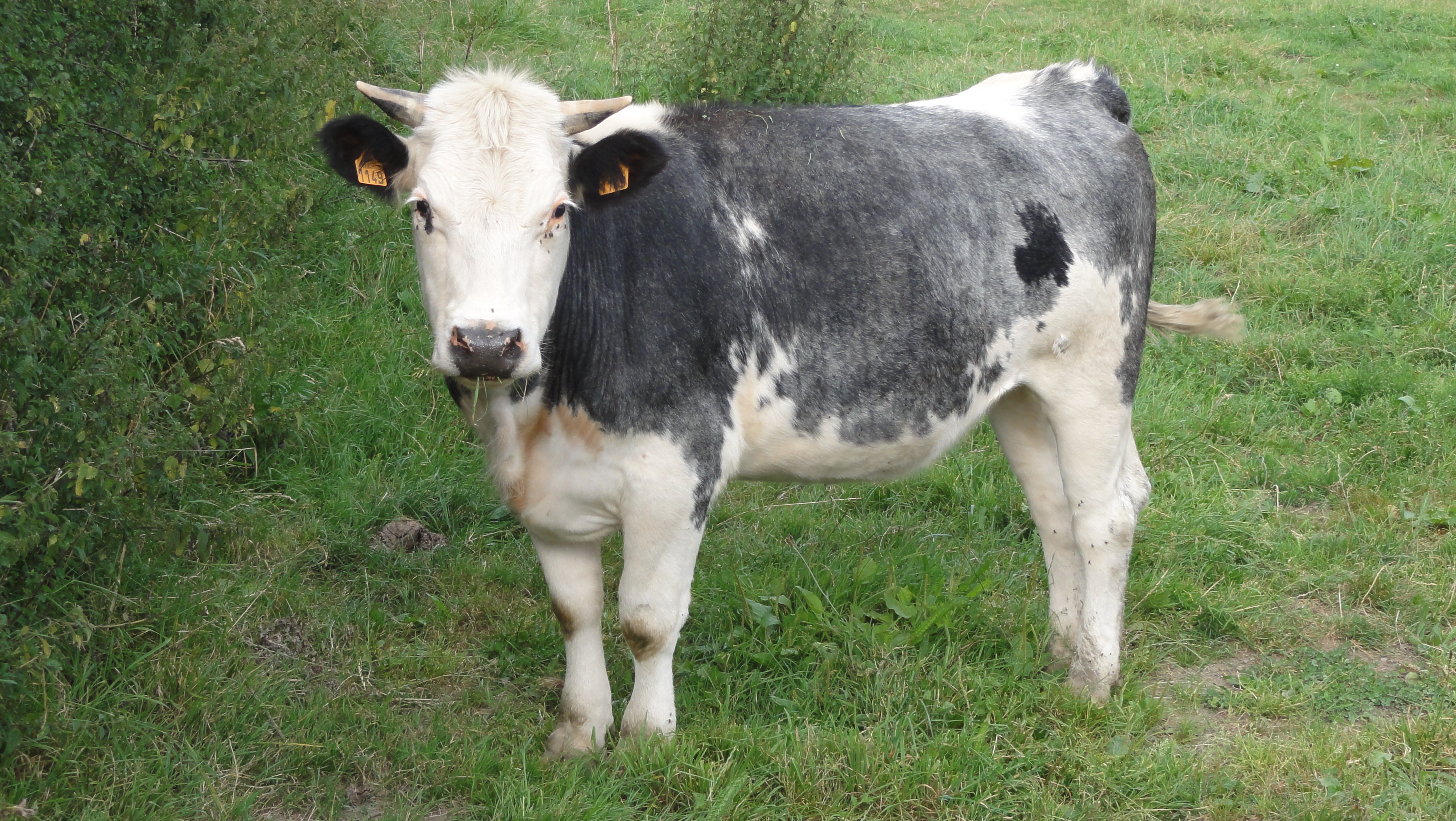 Génisse de race bleue dans l'avesnois près de Solre-le-Château.